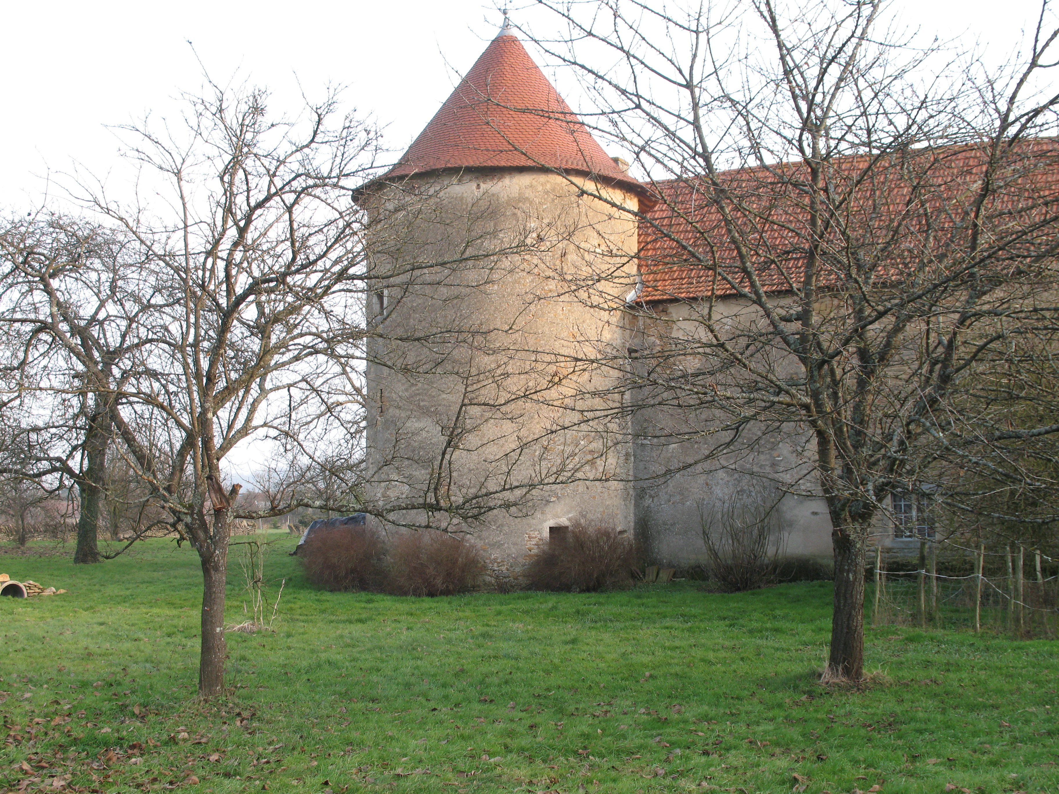 château de Saint-Mauris - Saint-Maurice-de-Satonnay (Saône-et-Loire)